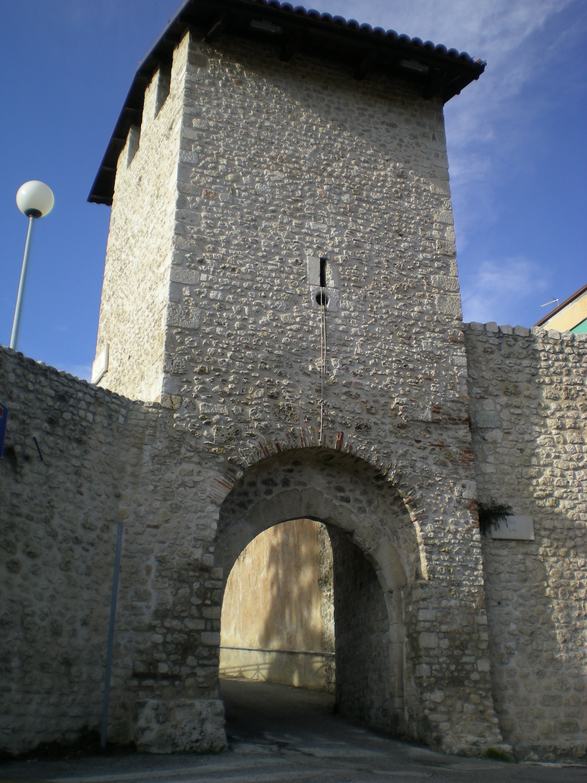 Porta Leoni (L'Aquila): vista esterna